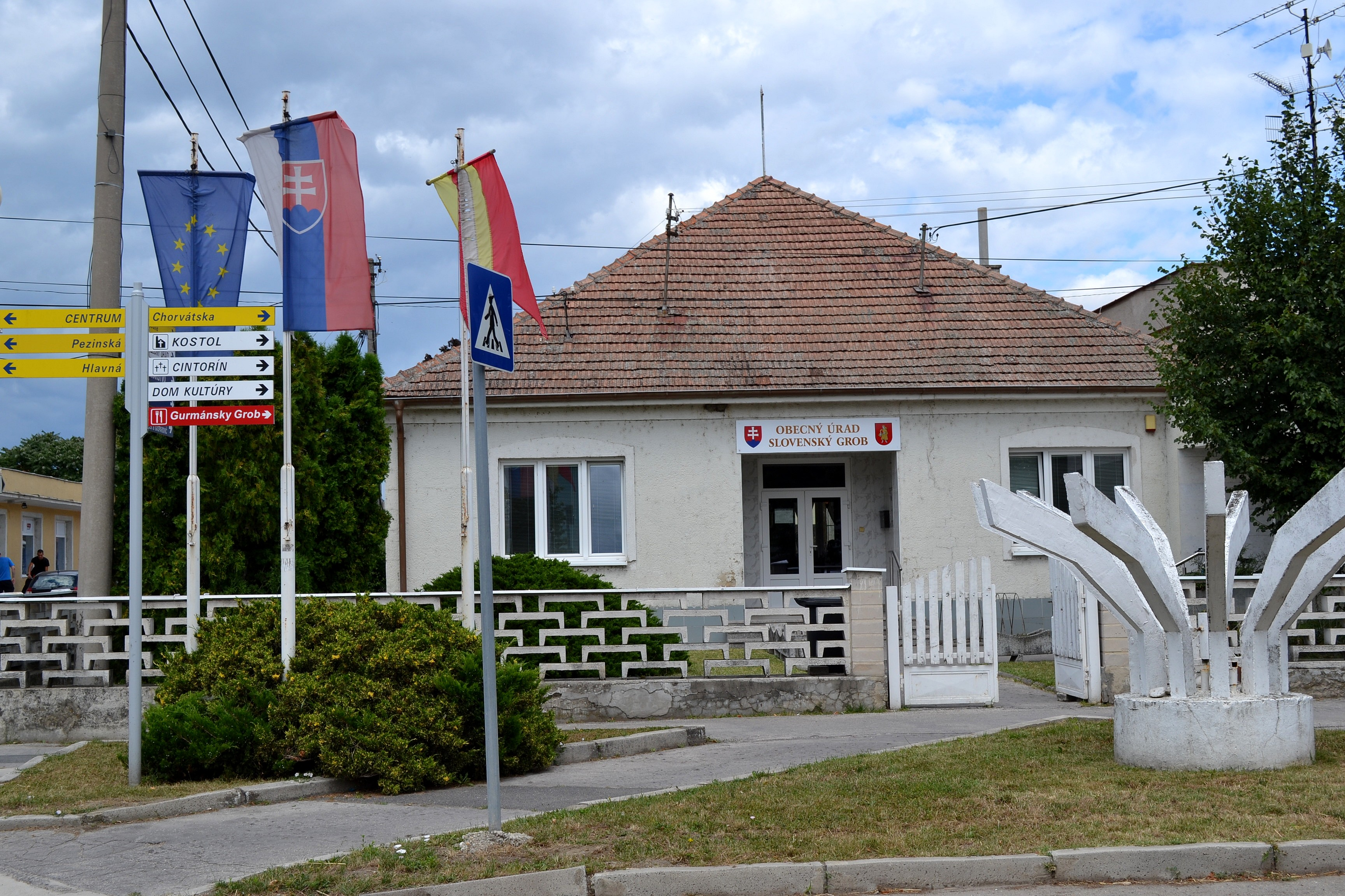 Slovenský Grob, budova obecného úradu